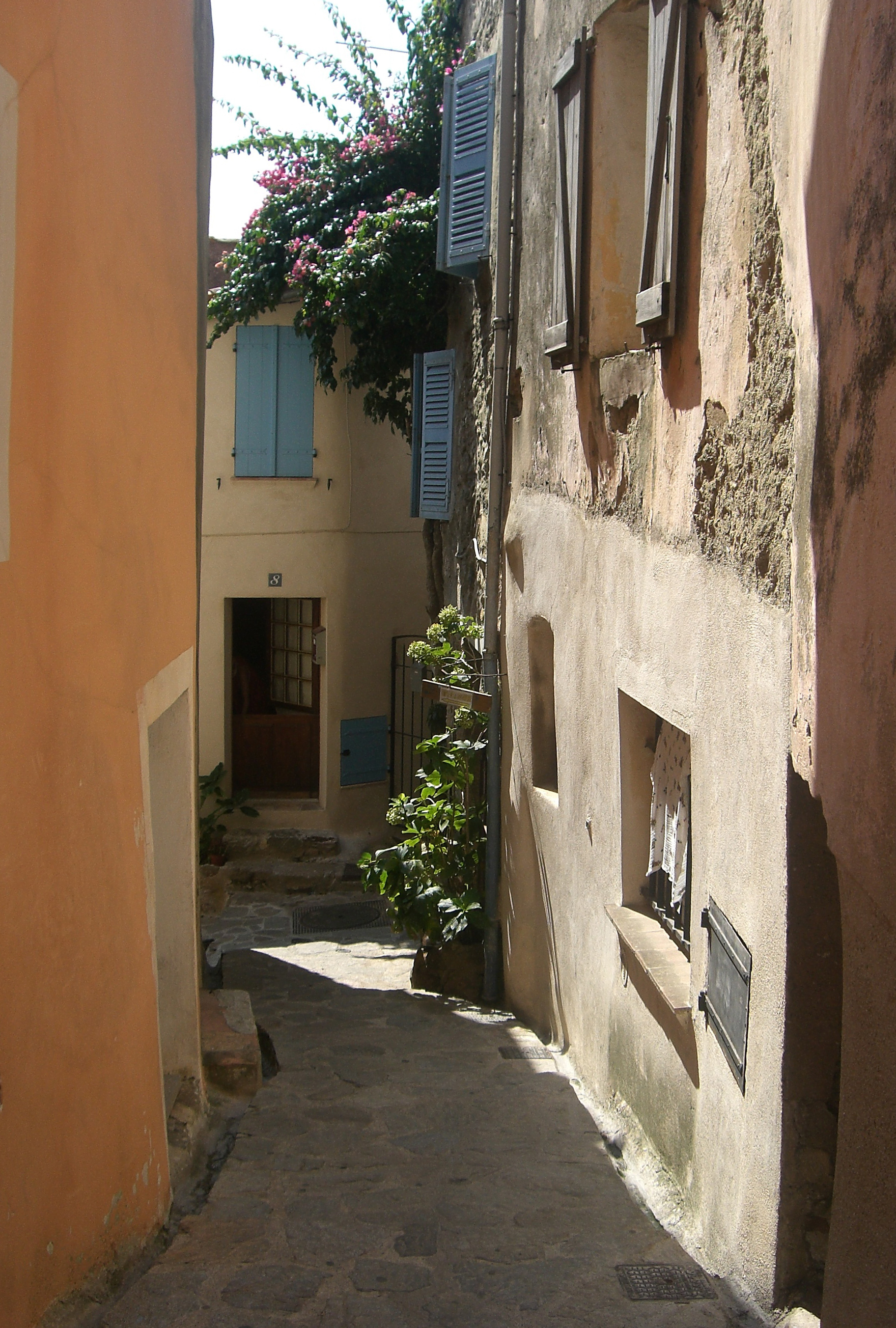 Ramatuelle